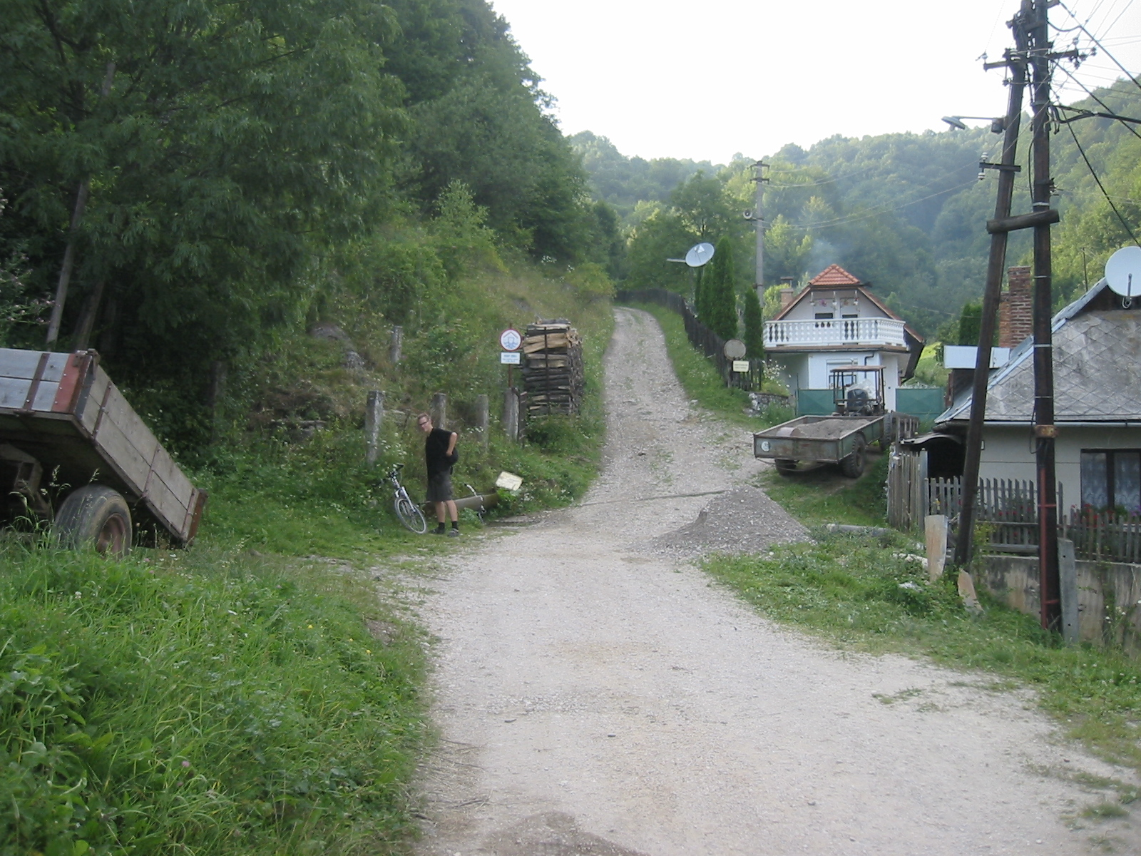 Quelle in Hačava